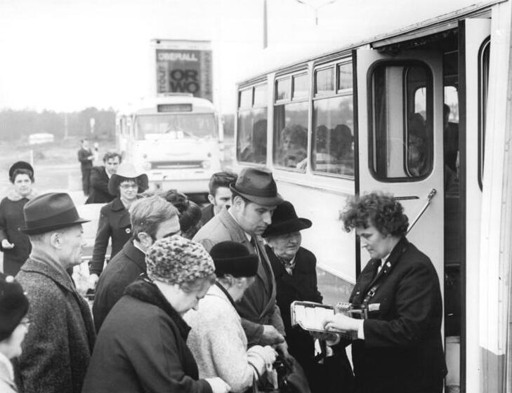 ADN-ZB Reiche-1.4.72-Berlin: Zeitweilige Regelung in Kraft-Zahlreiche Bürger aus Westberlin nutzten auch den 1.4.72, den vierten Tag der zeitweiligen Regelung auf der Grundlage der Geste des guten Willens, um in die Republik und ihre Hauptstadt einzureisen. Dank günstiger Autobusverbindungen können diese Besucher von der Grenzübergangsstelle Drewitz in kürzester Zeit nach Potsdam weiterreisen.